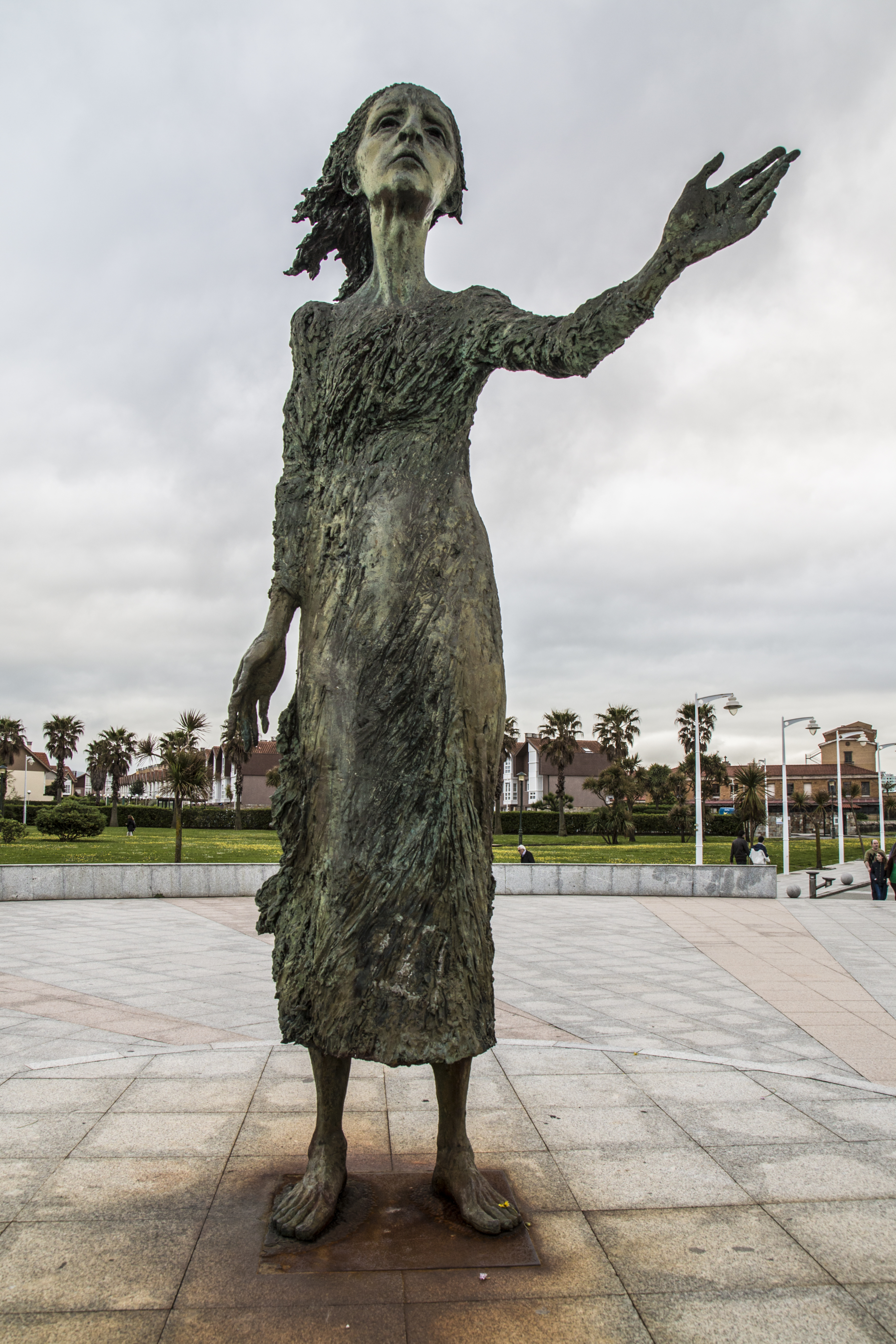 Madre del Emigrante. Gijón.